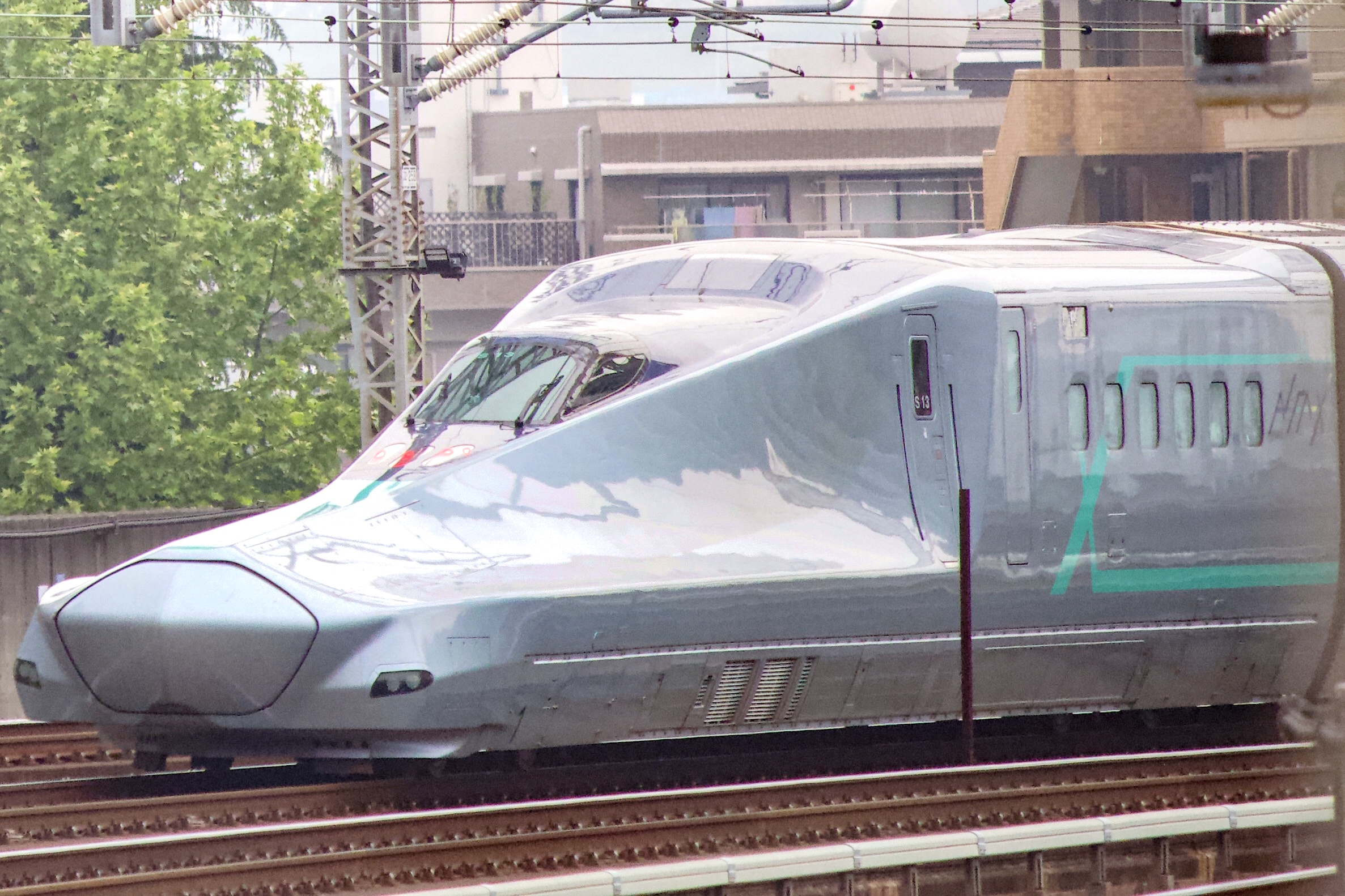 E956-1 2020年6月6日仙台駅にて撮影